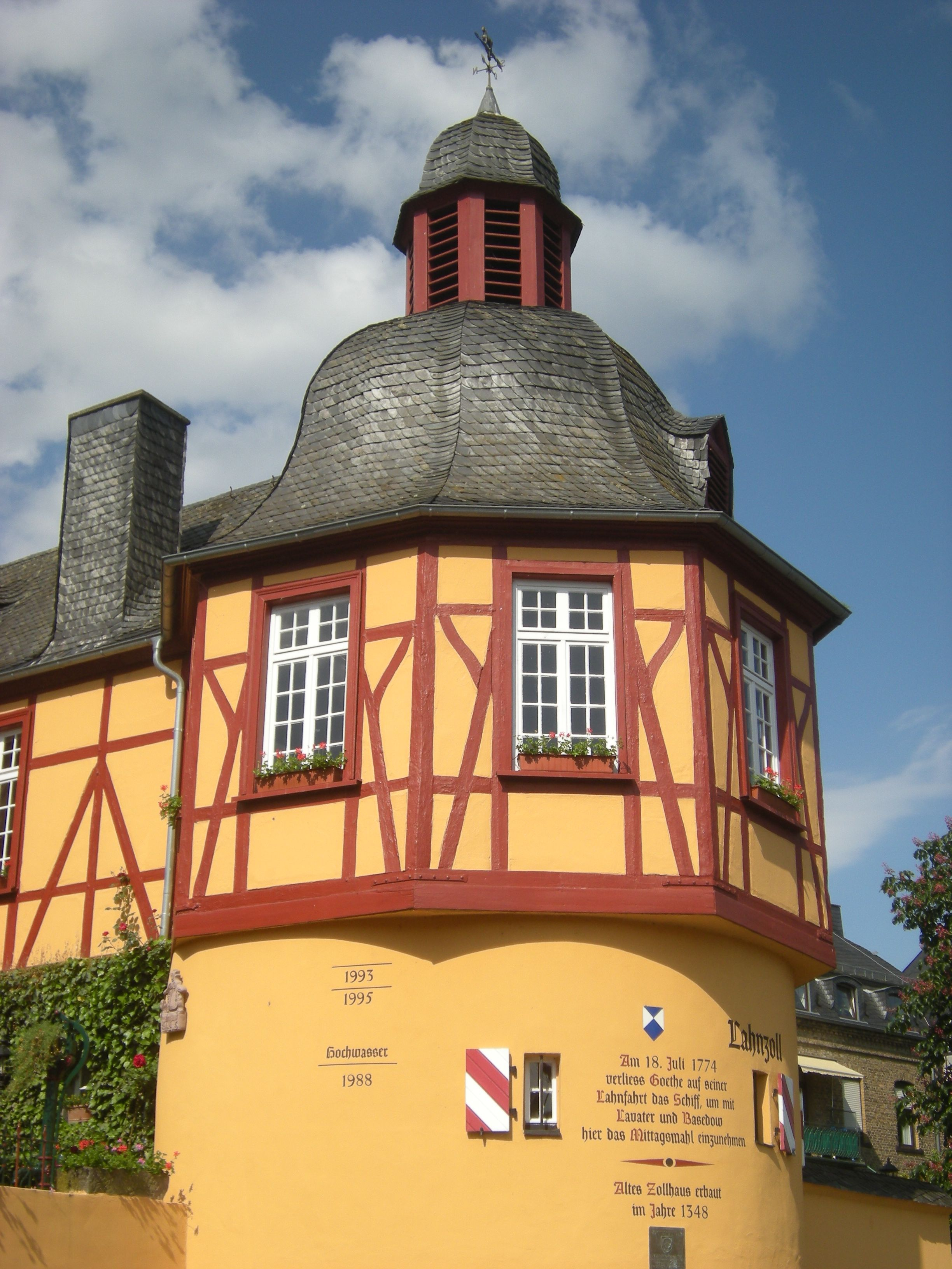 Lahnstein - Altes Zollhaus, Fachwerkturm.jpg